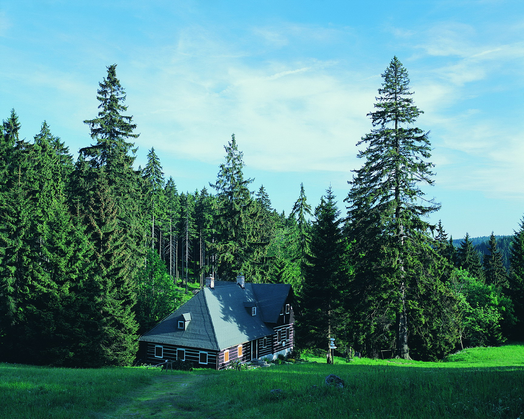 Muzeum skla a bižuterie v Jablonci nad Nisou - pobočka Bedřichov-Kristiánov, okres Jablonec nad Nisou.